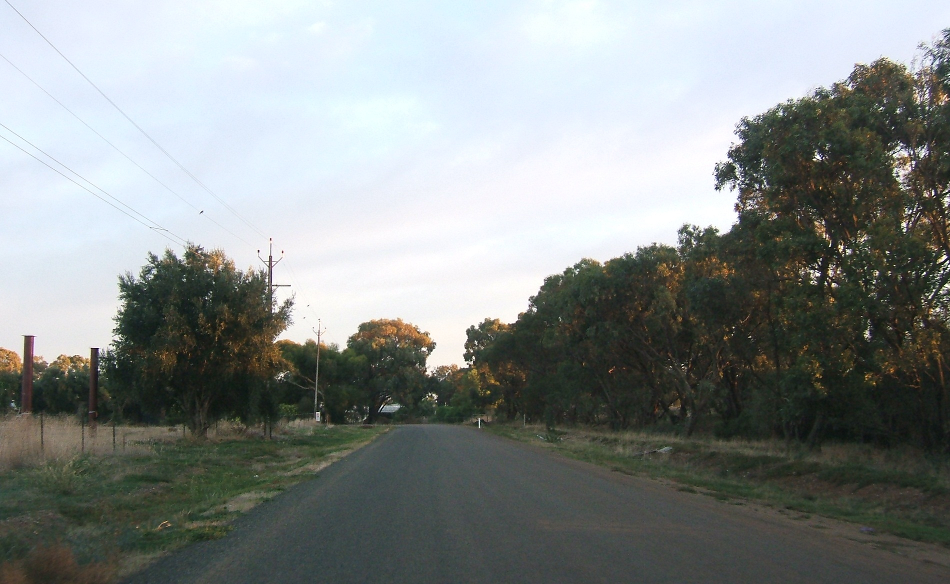 Buckland Park, Adelaide